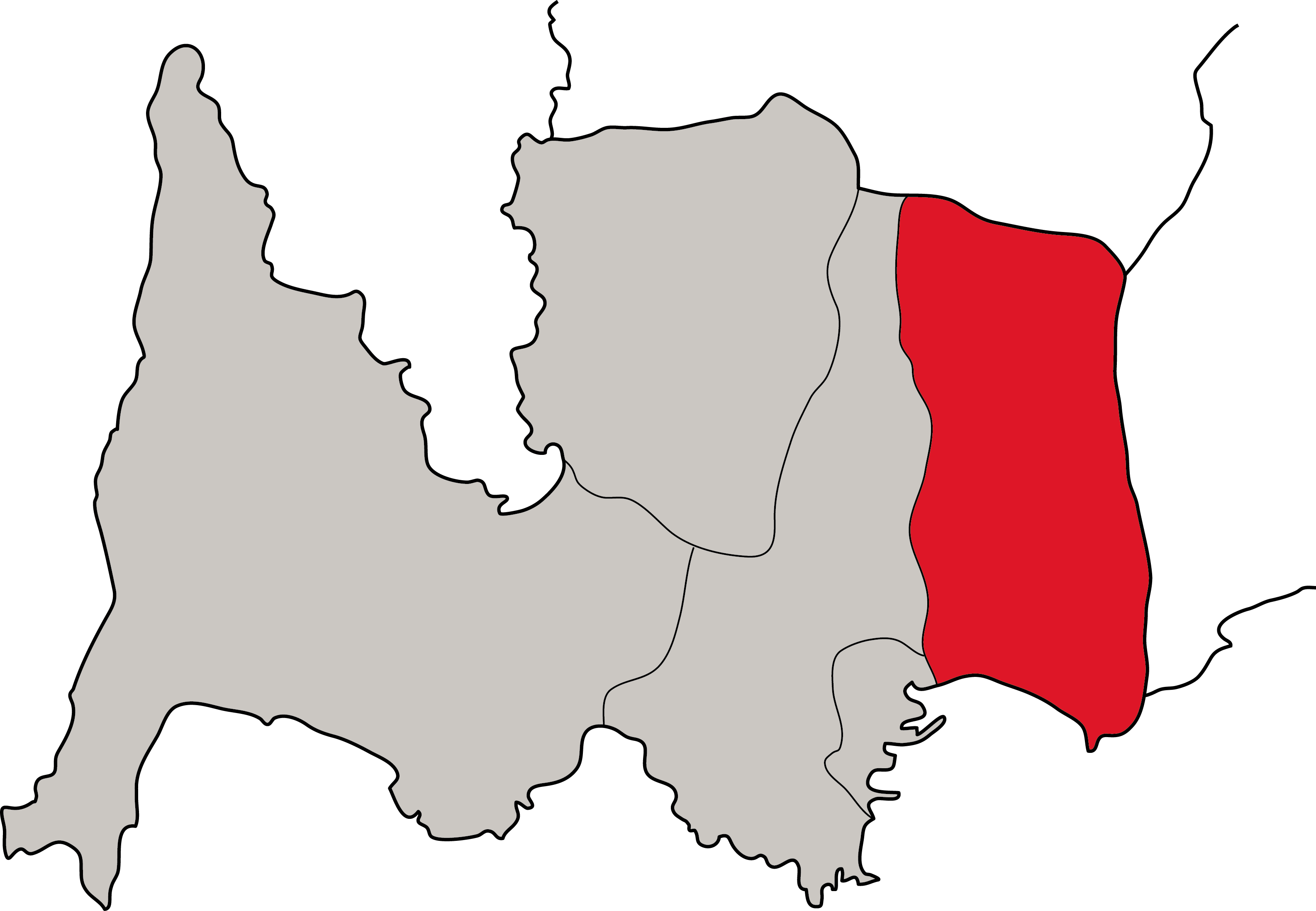 Localizacion da parroquia de Coiro no concello de Cangas.